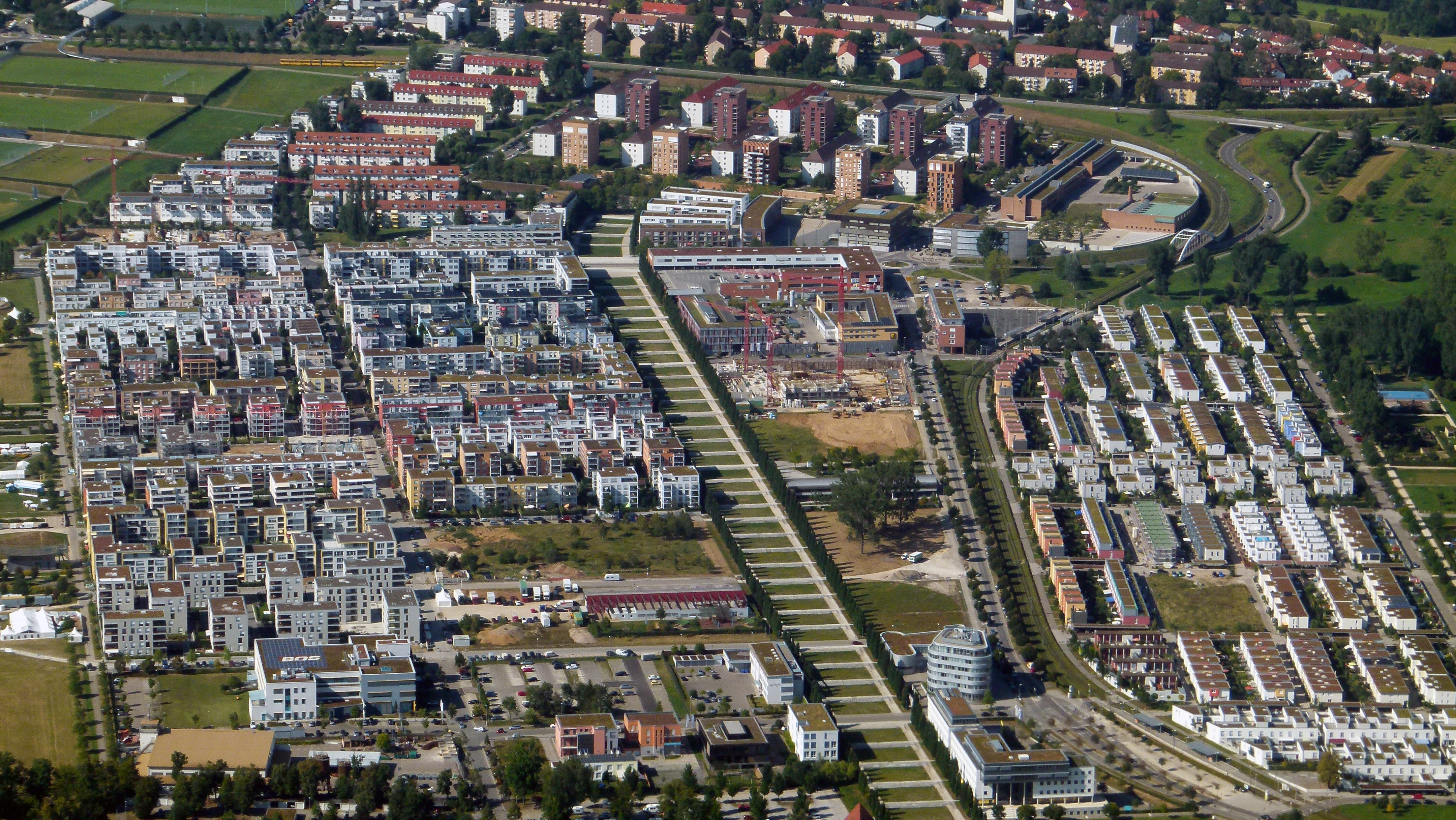 Blick auf den Scharnhauser Park vom Flugzeug, Ostfildern